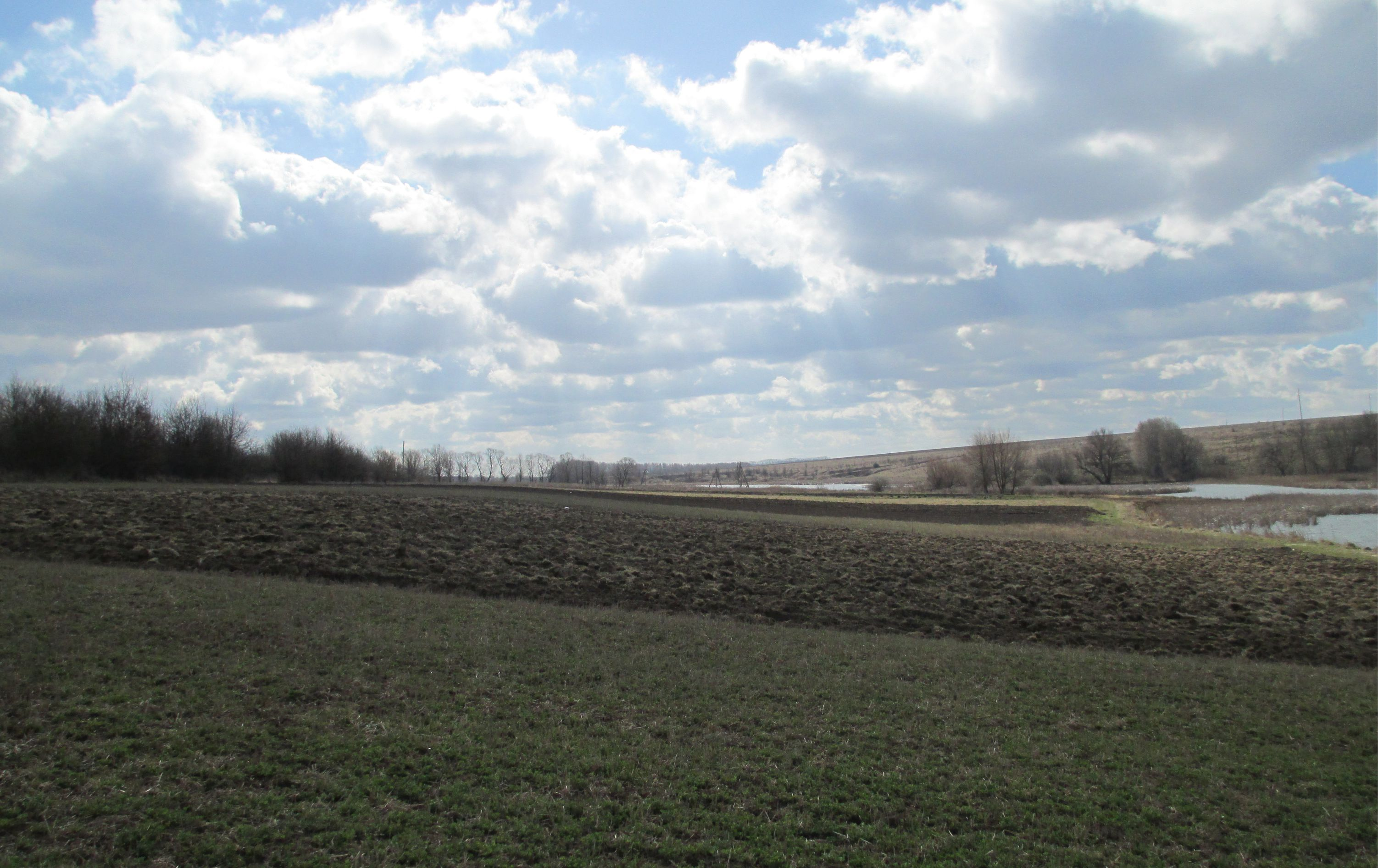 Поселення черняхівської культури, Ялтушків